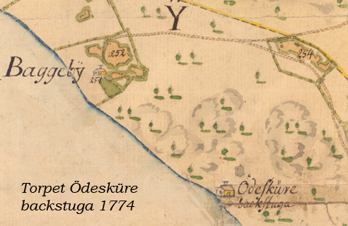 Det ursprungliga torpet i dalsänkan vid Lidingsberg på Lidingö dokumenterad på en karta från 1720, benämnt "Ödeskure backstuga". Vid torpet fanns ingen uppodlad mark. Torpet låg inom lantbruksgården Baggeby-Bodal som utgjorde en gemensam lantbruksfastighet med två separata gårdsenheter.